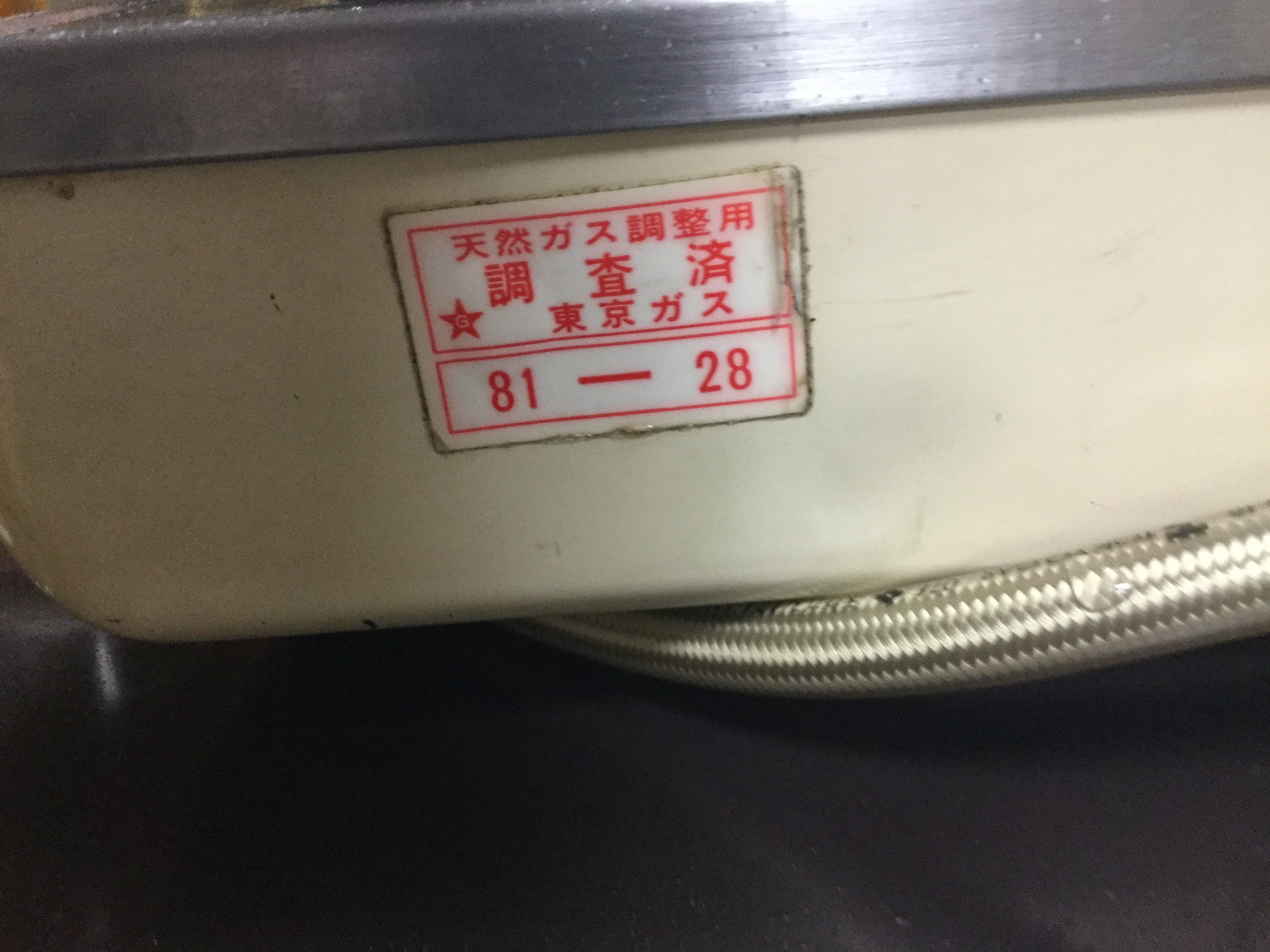 東京ガス管内。天然ガス調整時に貼られたシール。